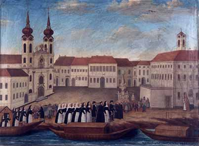 A budai Felsővásártér (a későbbi Batthyány tér) 1785-ben az Erzsébet-apácák megérkezésekor